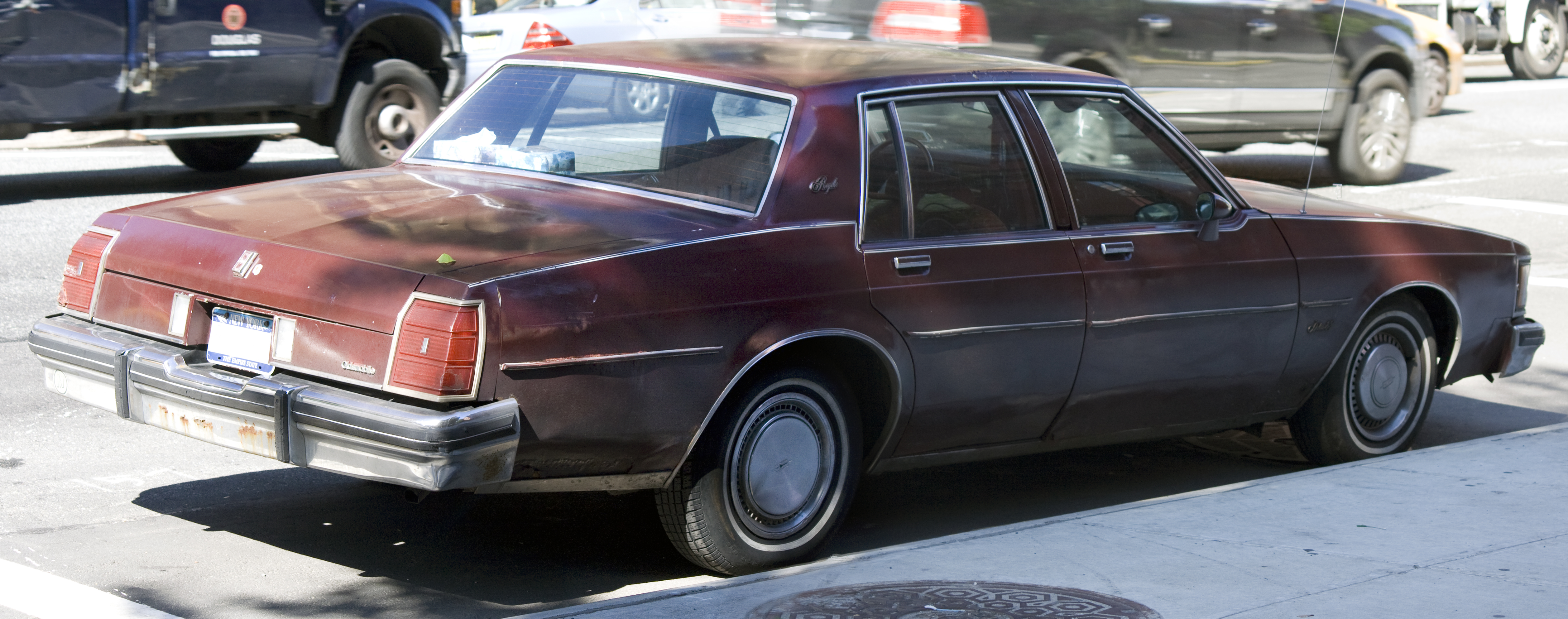 1983 Oldsmobile Delta 88 Royale sedan